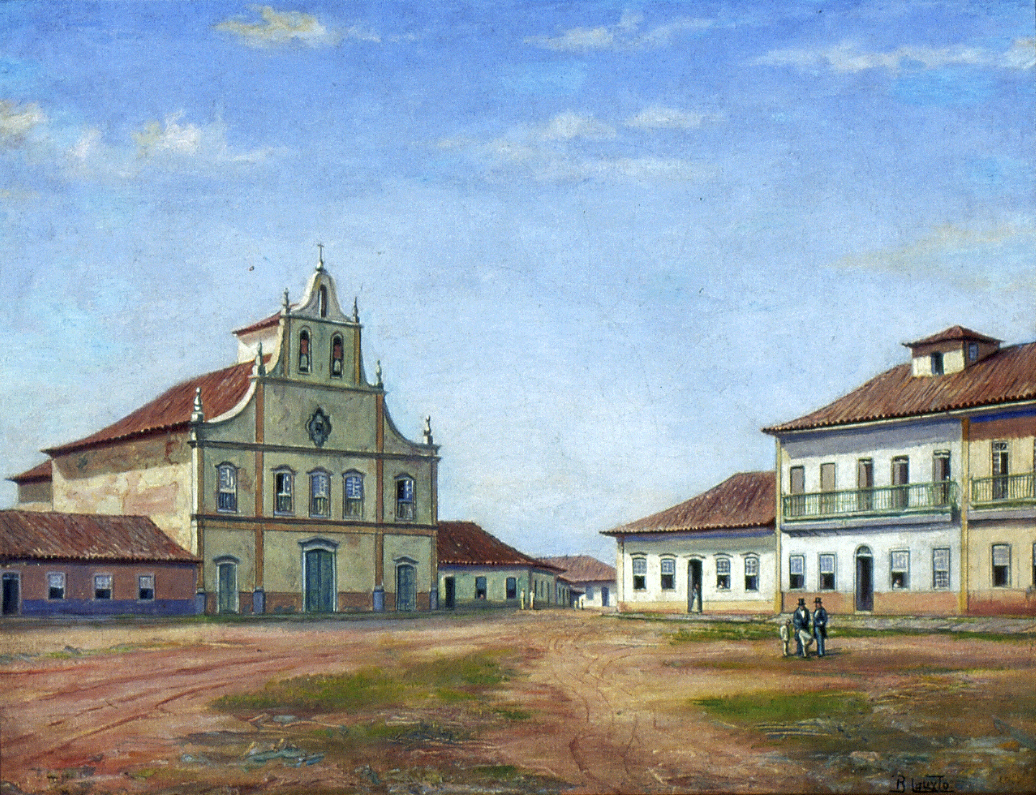 Obra que integra o acervo do Museu Paulista da USP. Coleção Benedito Calixto de Jesus - CBCJ